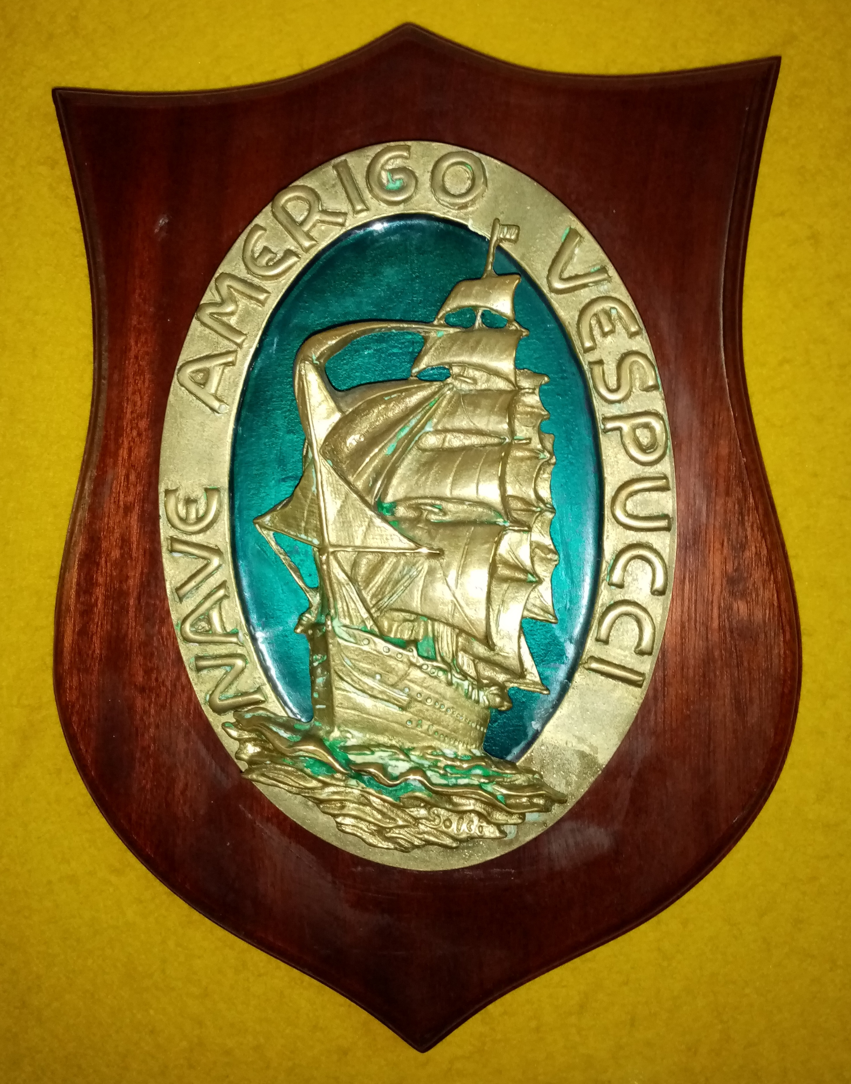 Crest raro del veliero Amerigo Vespucci